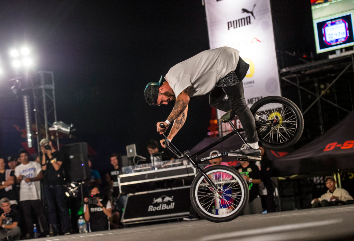 Japon